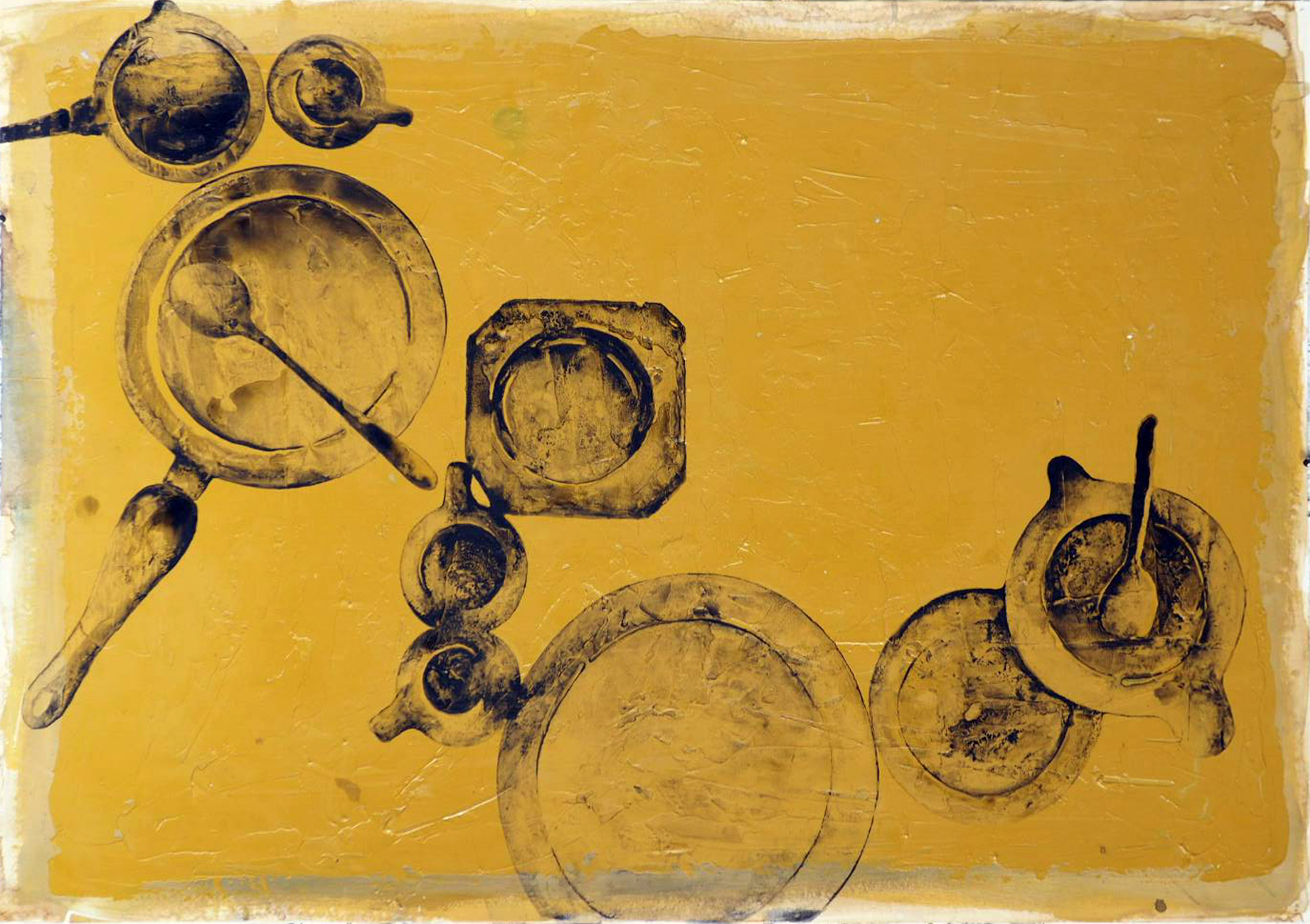 Без назива, Комбинована техника, 2018. 100 х 70 цм, уметничко дело аутора Данице Веселиновић Лиценцирање Template:Za ostavu